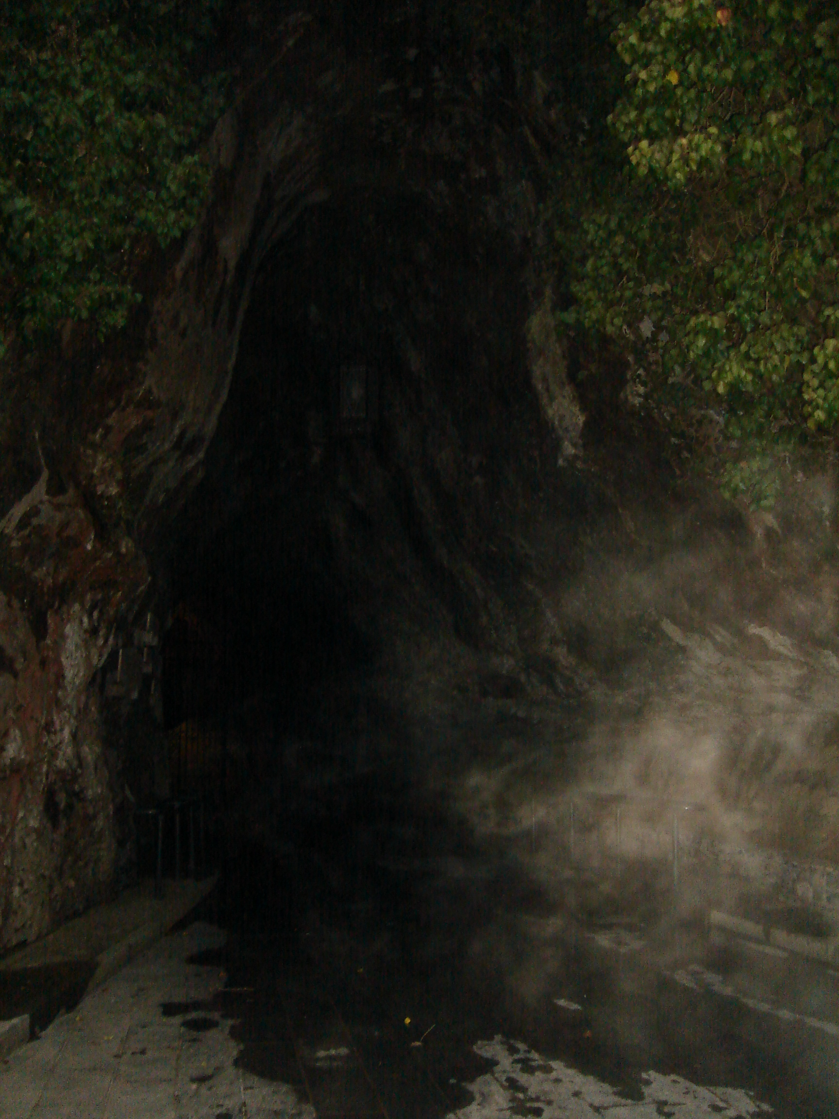 Postojnska jama